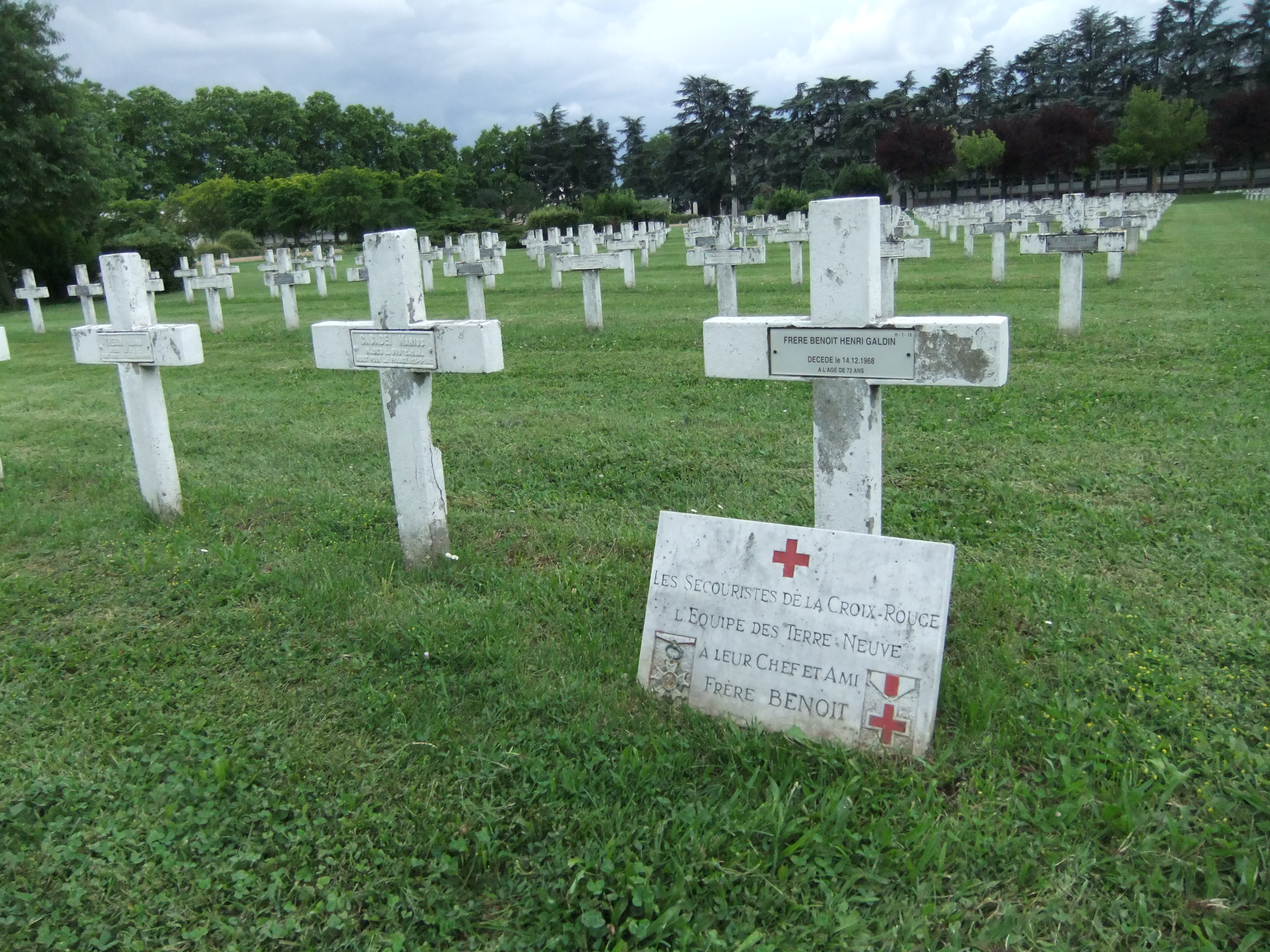 Villeurbanne - Nécropole nationale de la Doua - Tombe de Henri Galdin dit "Frère Benoit"